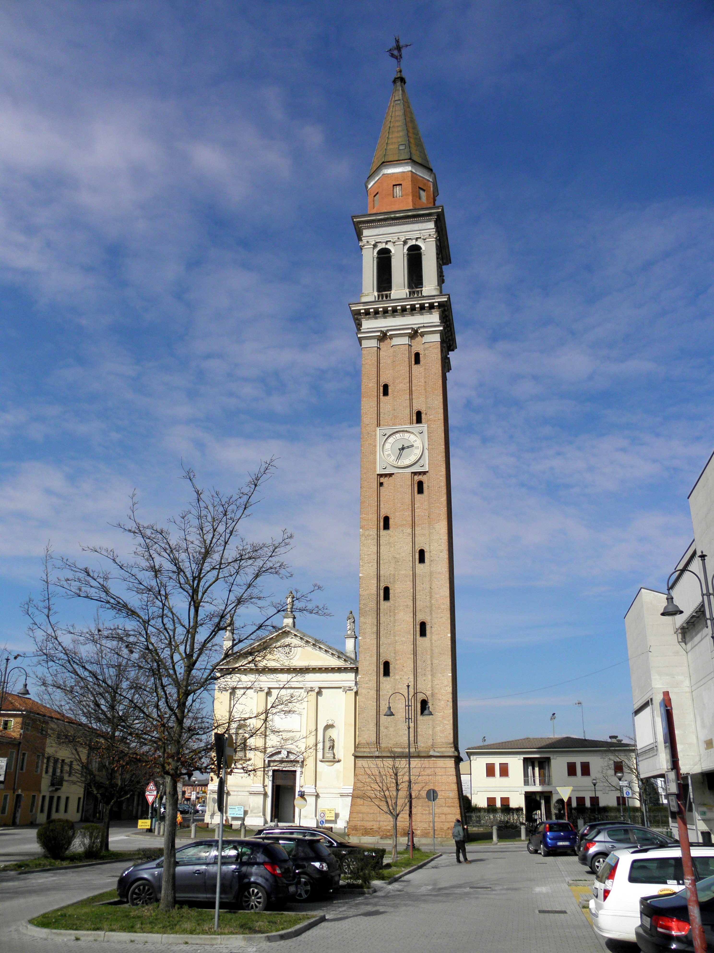 Camponogara: il campanile, e in secondo piano, la chiesa parrocchiale di Santa Maria Assunta e San Prosdocimo.